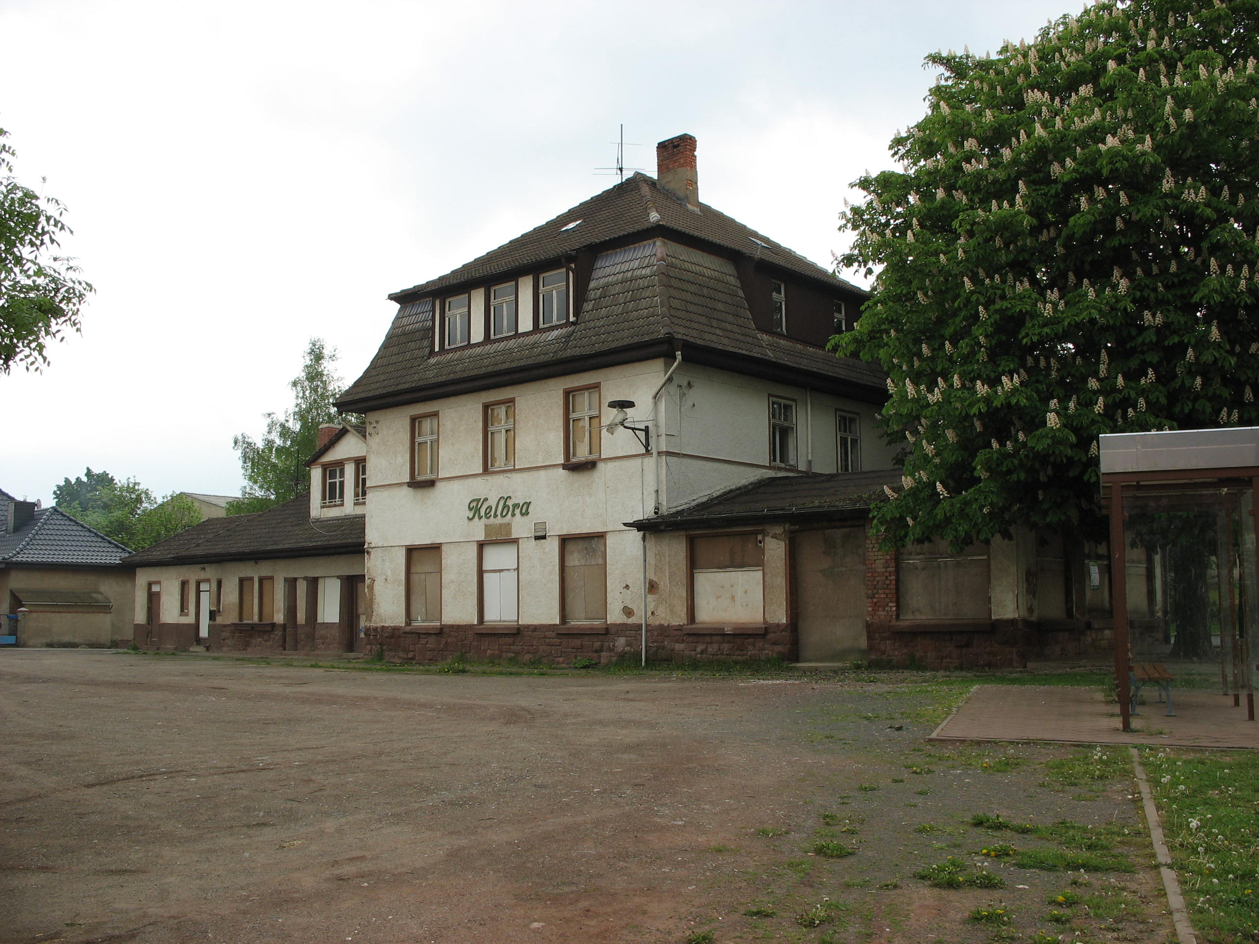 Ehemaliger Bahnhof Kelbra der Kyffhäuser KleinbahnThis is a photograph of an architectural monument. 84659